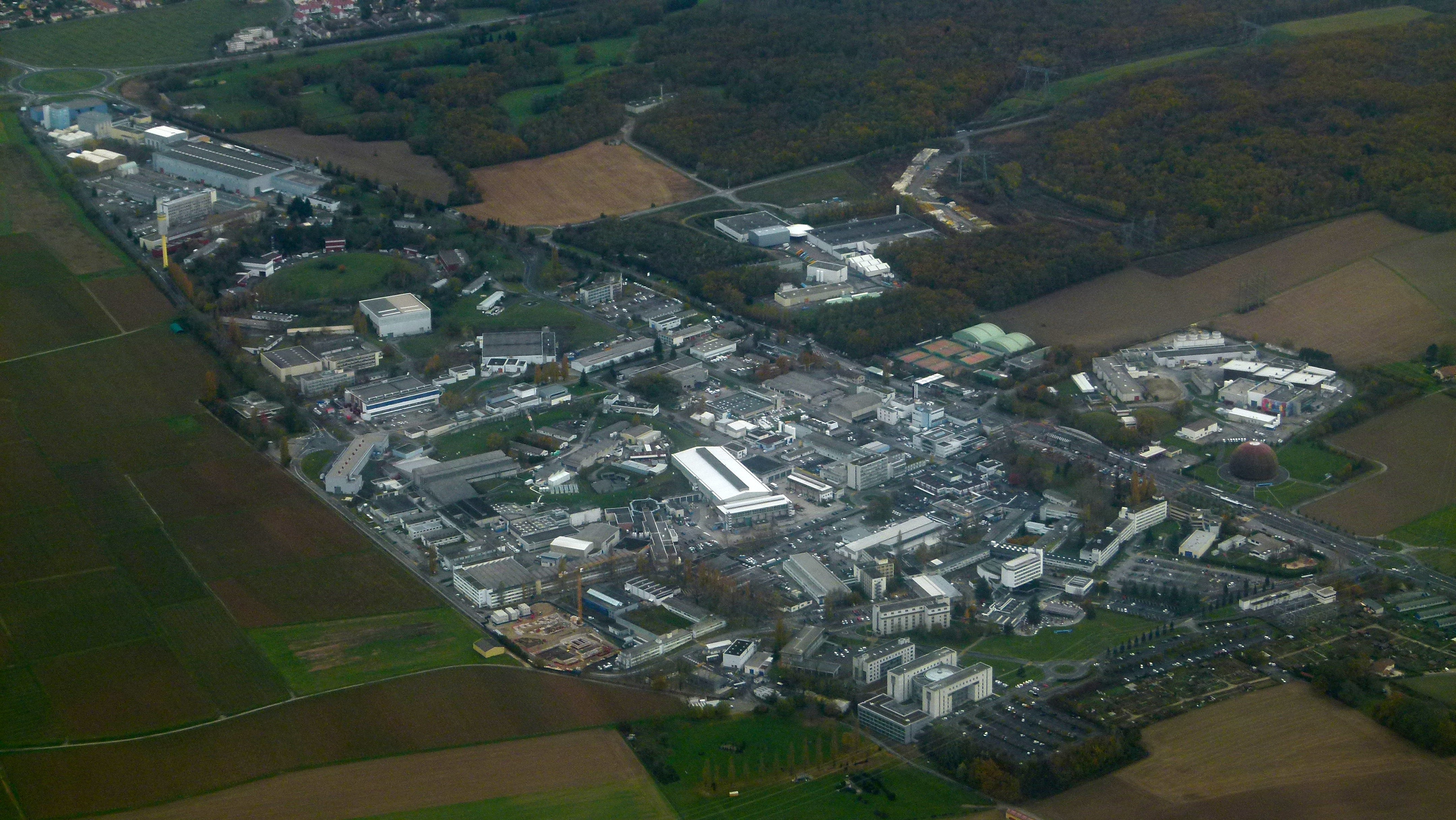 Luftbild vom CERN